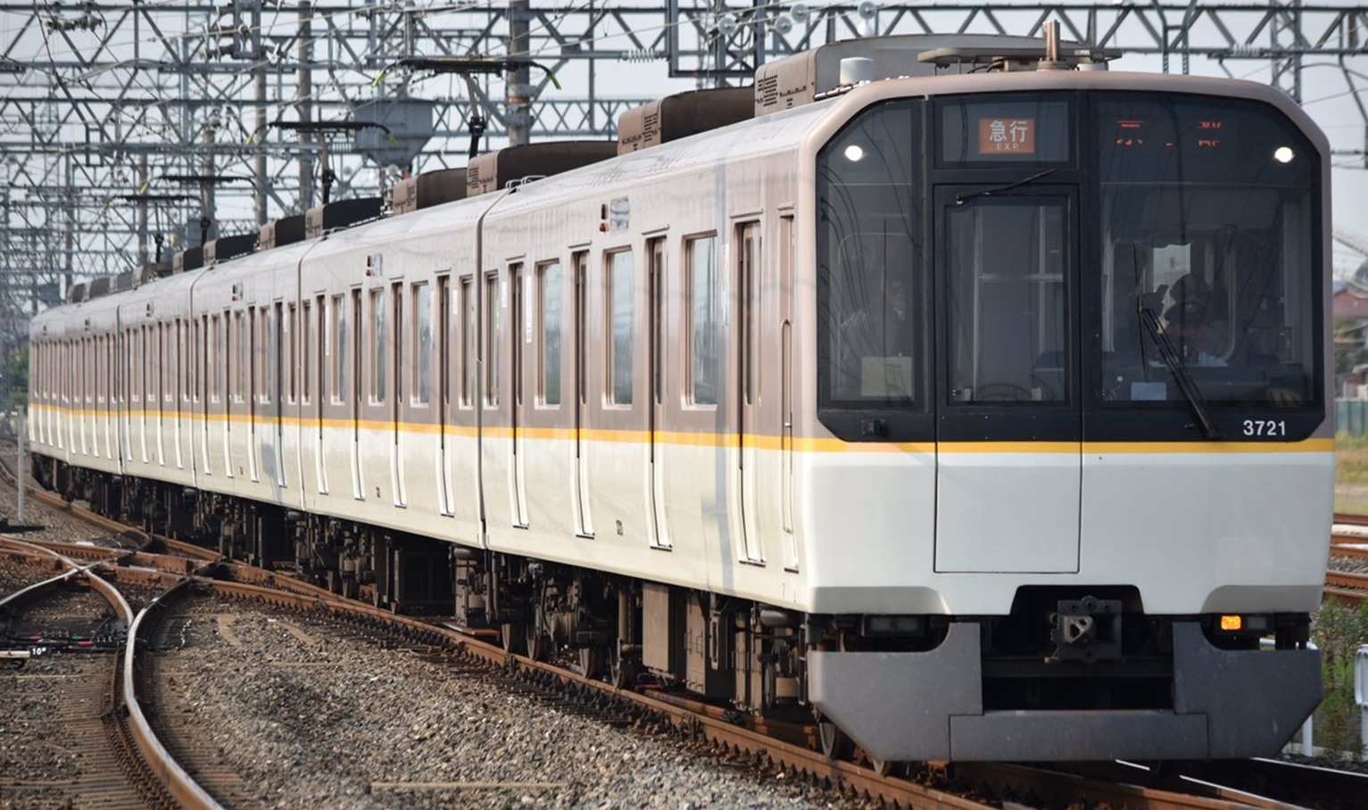 近鉄3220系KL21編成 急行京都行き